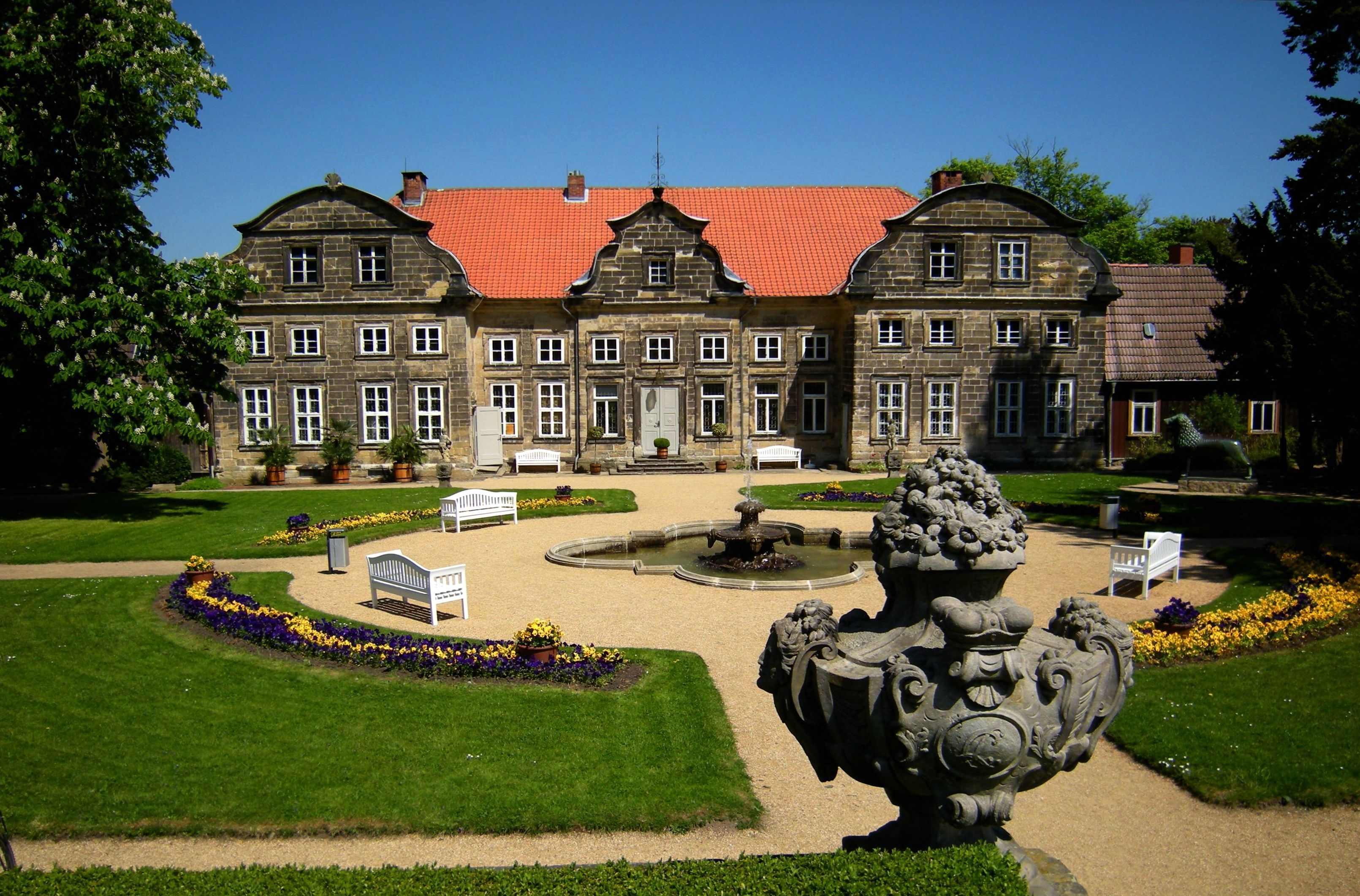 Blankenburg - Schloß mit Barockgarten.jpg